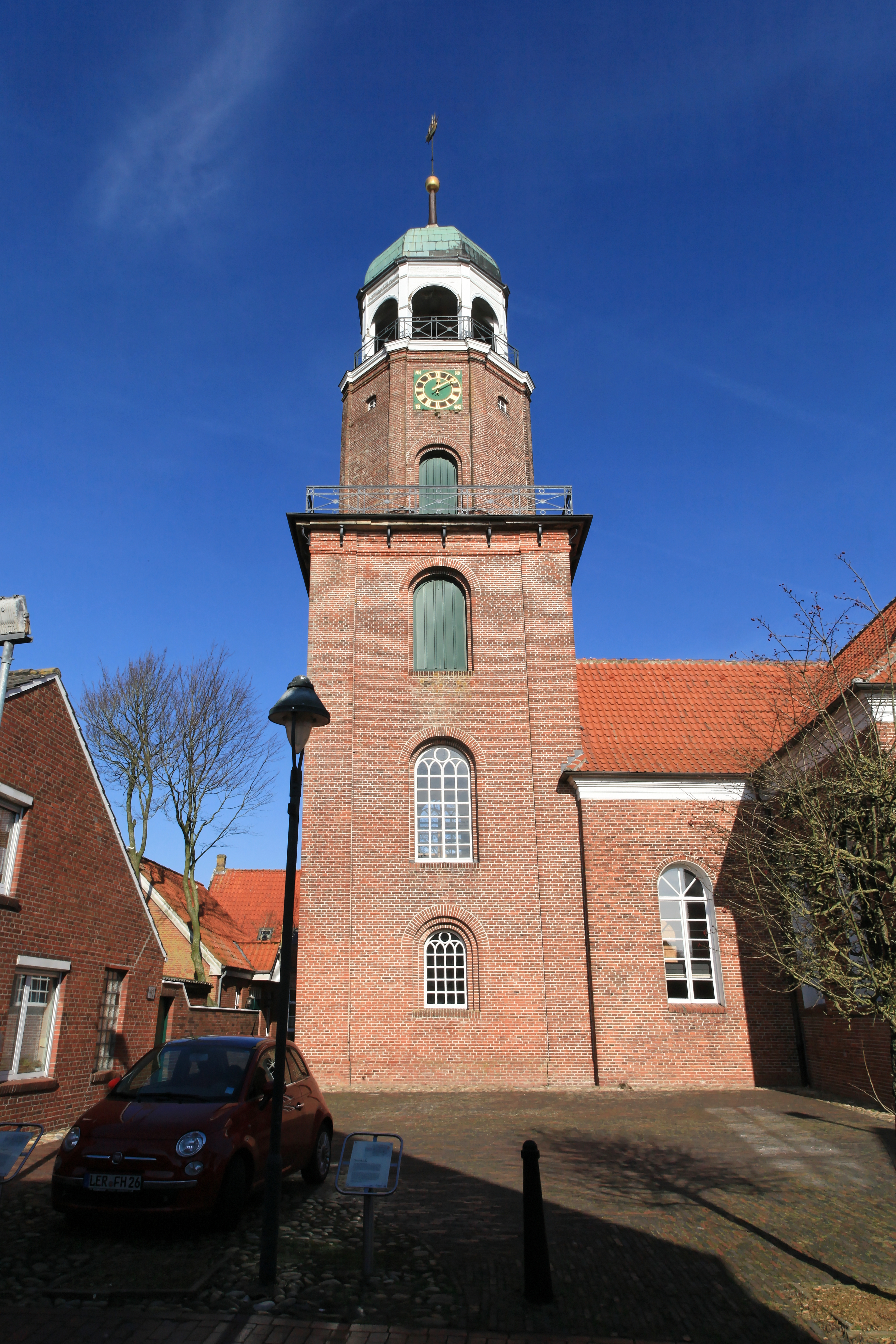 Reformierte Kirche, Lange Straße in Jemgum